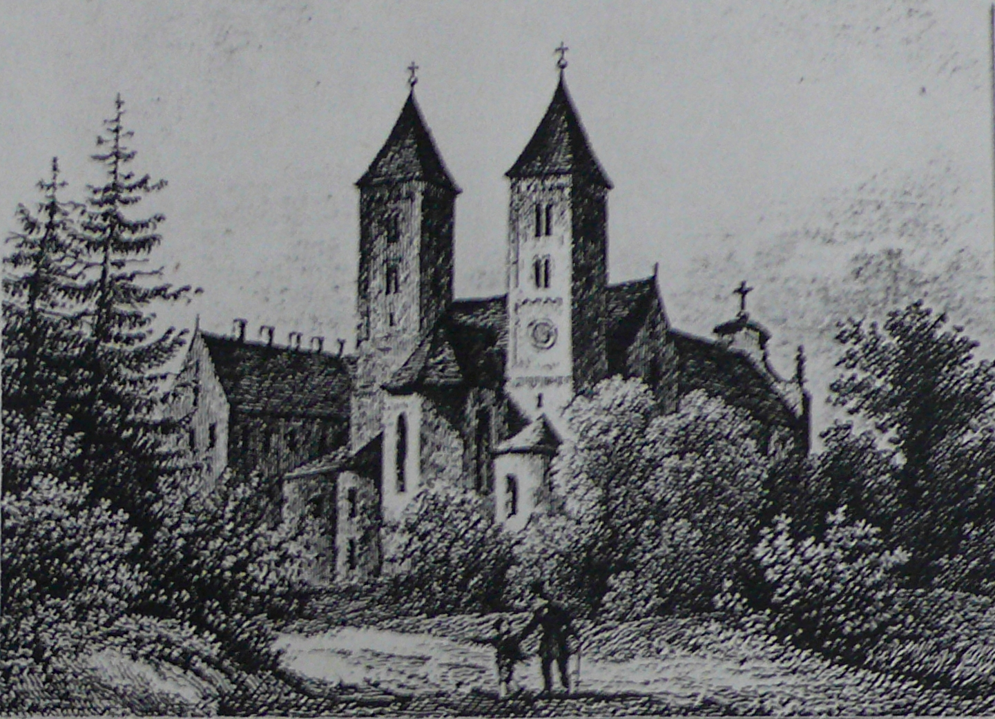 Klosterkirche St. Georg in Prüfening Regensburg